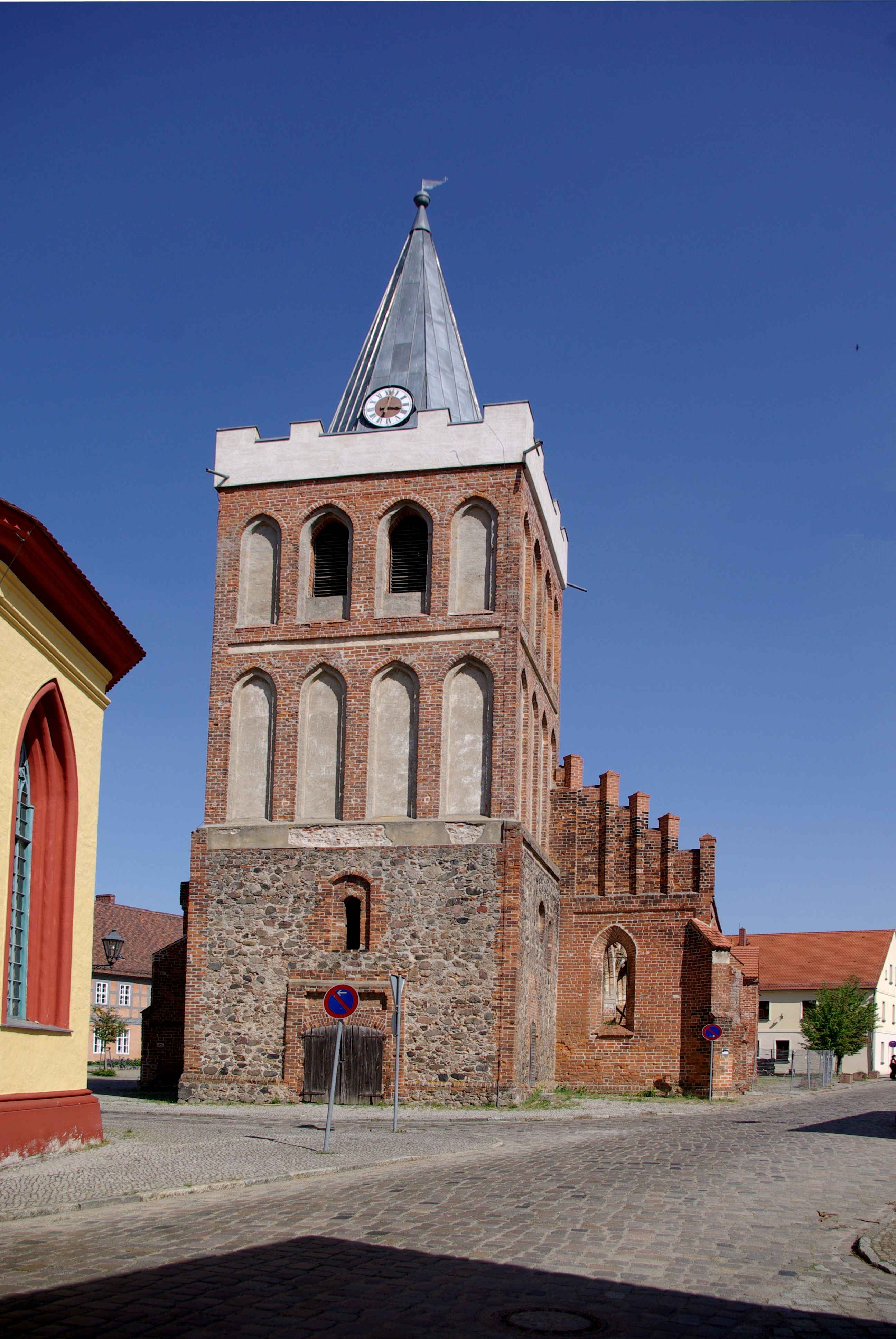 Lieberose in Brandenburg. Der Westturm der 1945 zerstörten Stadtkirche ist erhalten geblieben und steht unter Denkmalschutz.